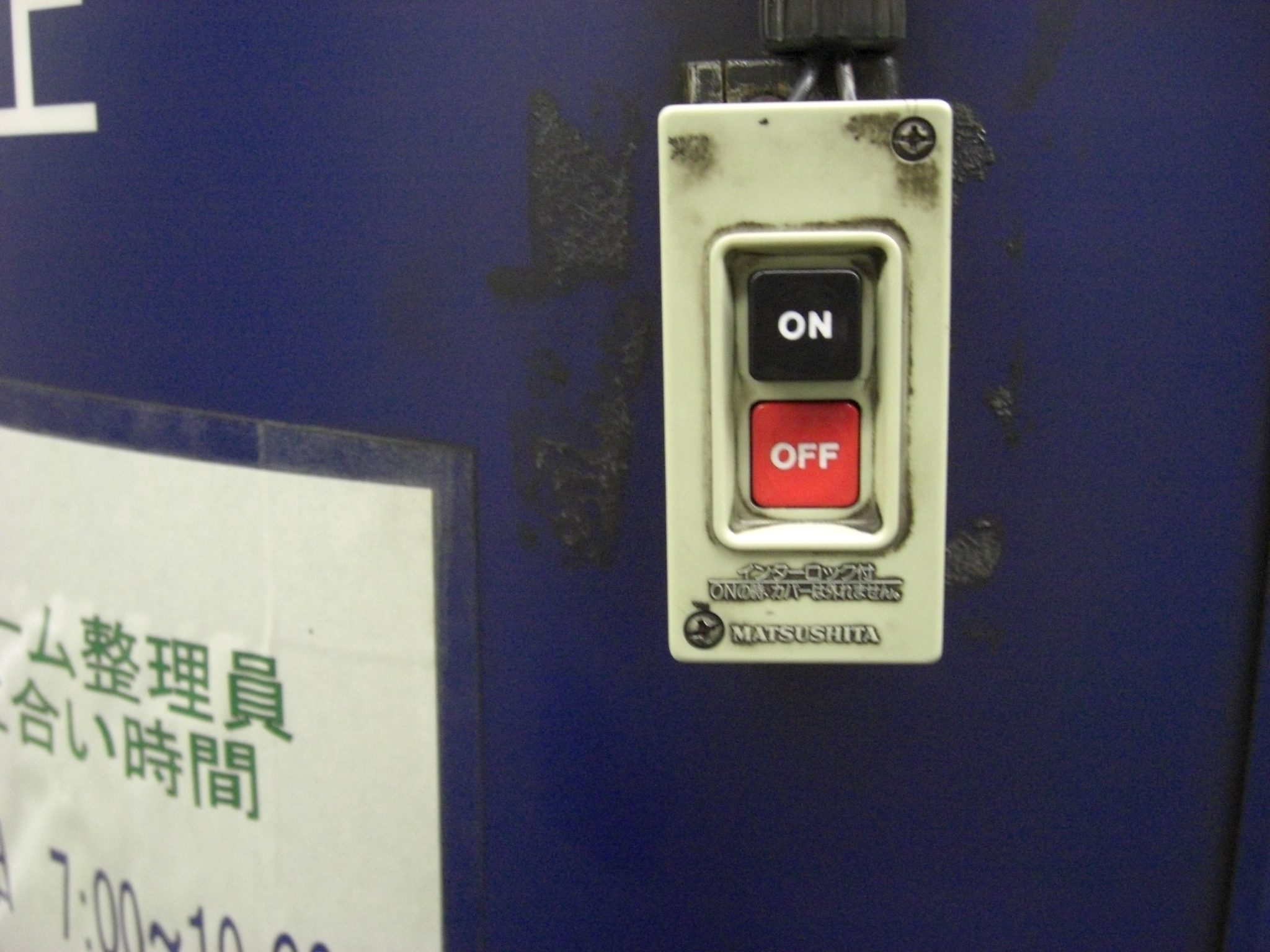 千代田線西日暮里駅ブザースイッチ